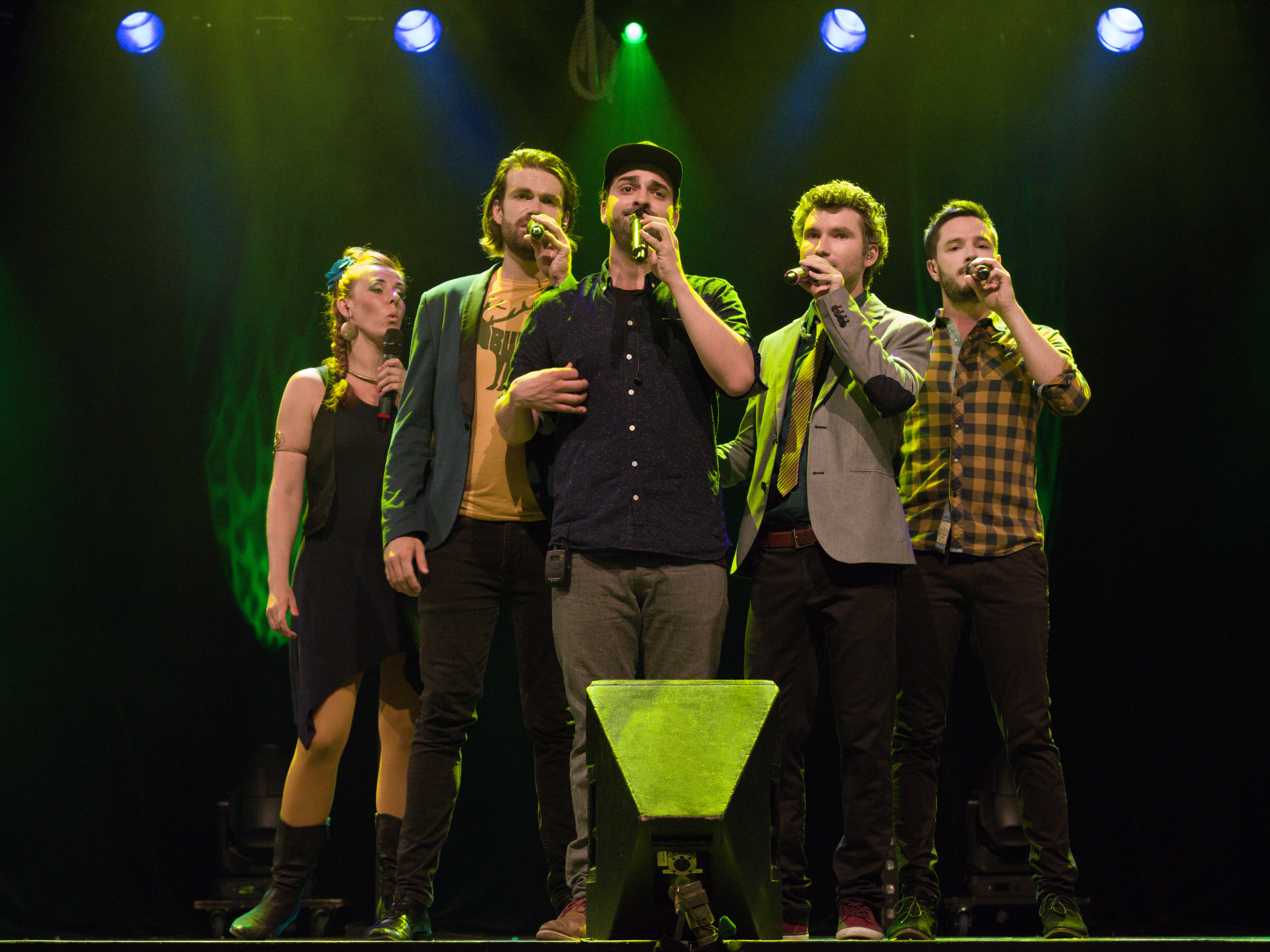 Bilder vom Zelt Musik Festival 2016 in Freiburg im Breisgau Sie A capella Band Unduzo